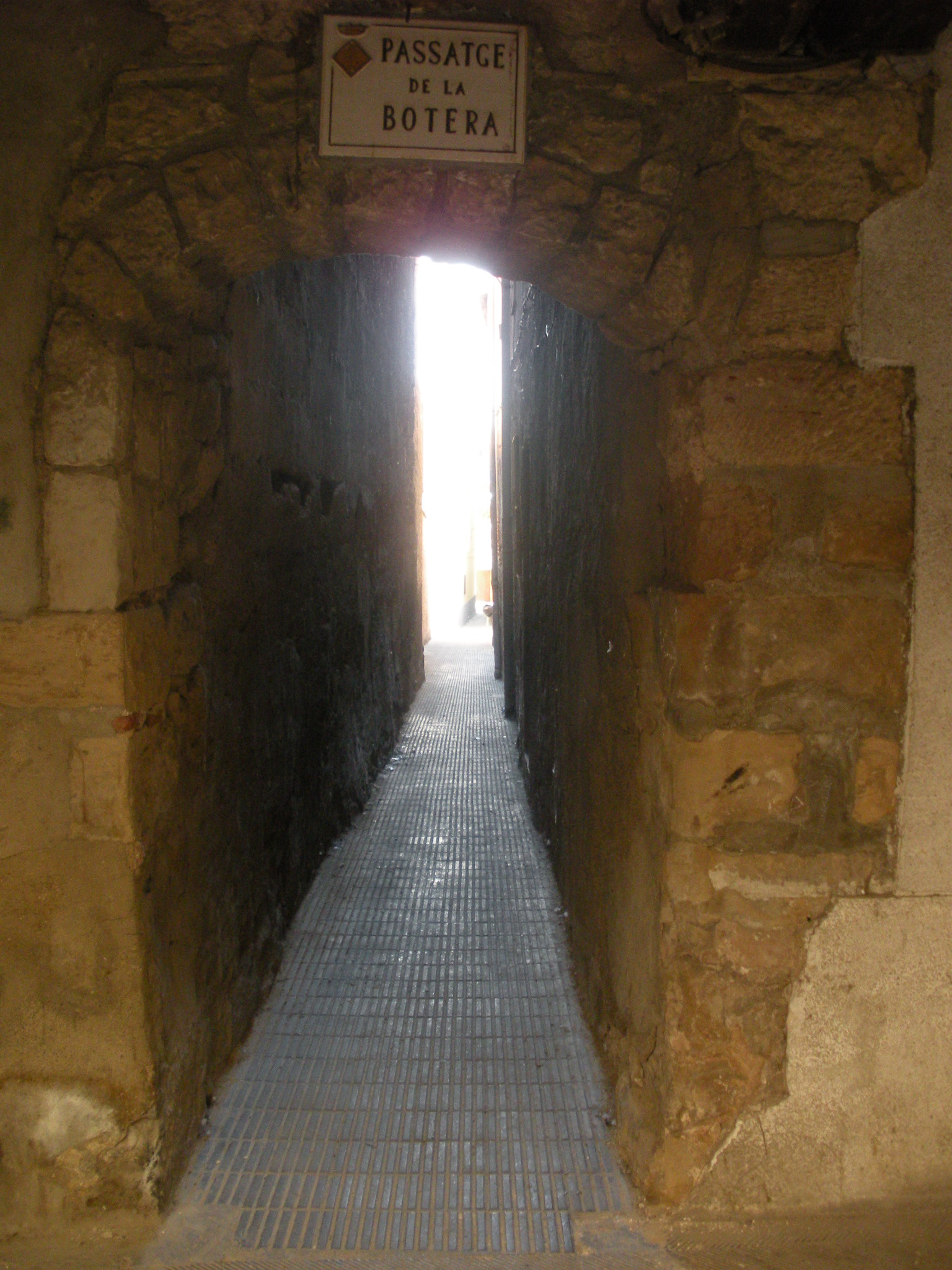 Carrer La Botera (Juneda)